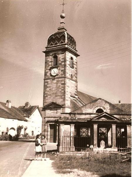 Ancienne Fontaine Mersuay années 50